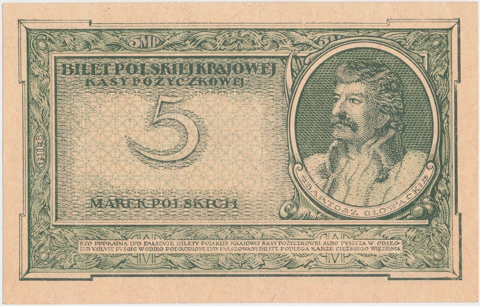 5 marek polskich 1919 maj rewers